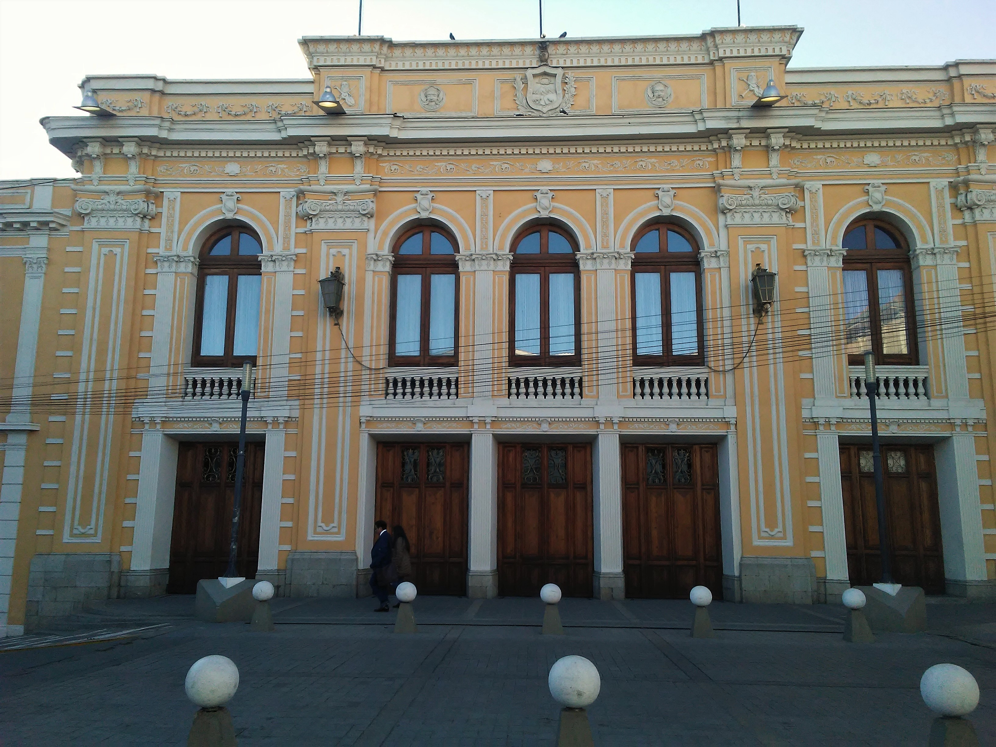 Teatro Municipal Alberto Saavedra Pérez This medium shows the protected monument with the number L/00-044 in Bolivia.